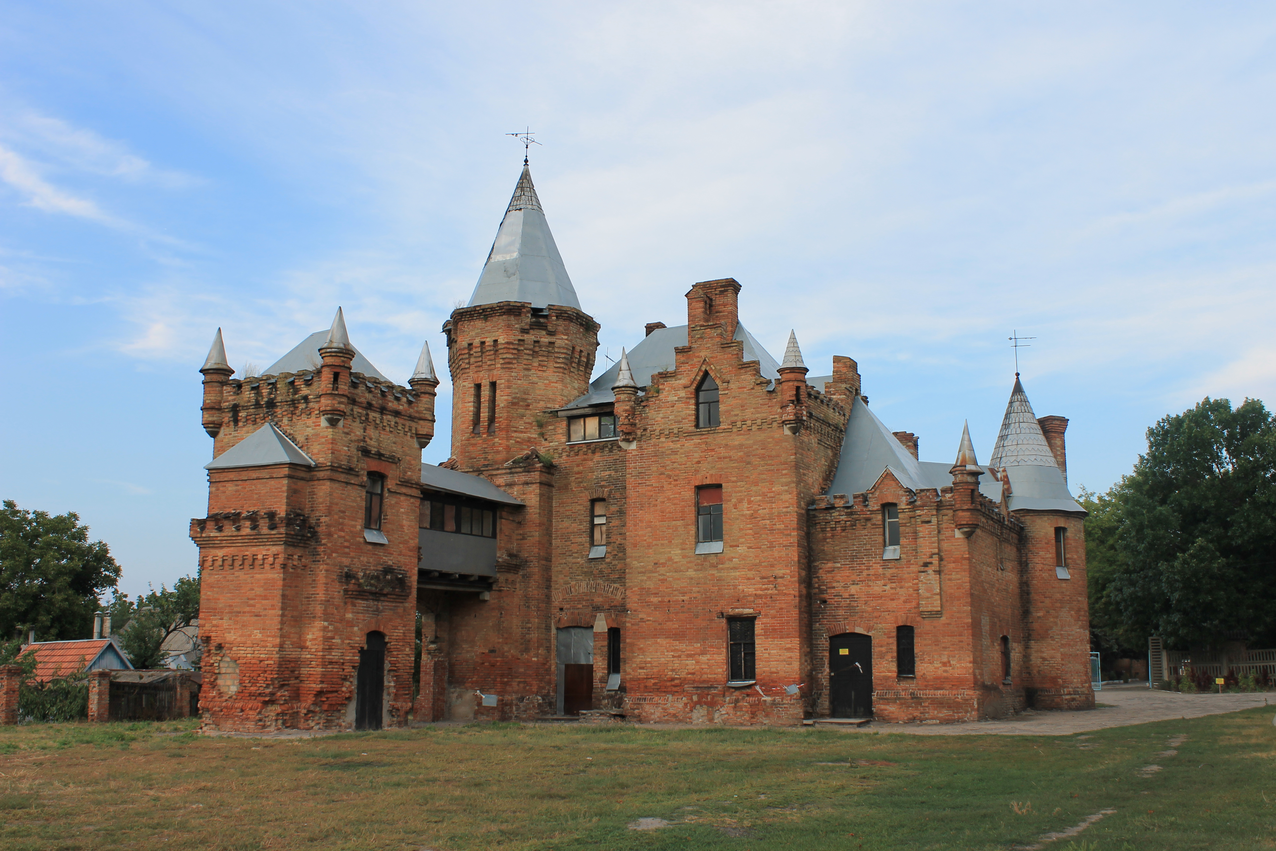 Палацовий комплекс ВДІАМЗ «Садиба Попова», вул.Гагаріна, м.Василівка, Запорізька обл.